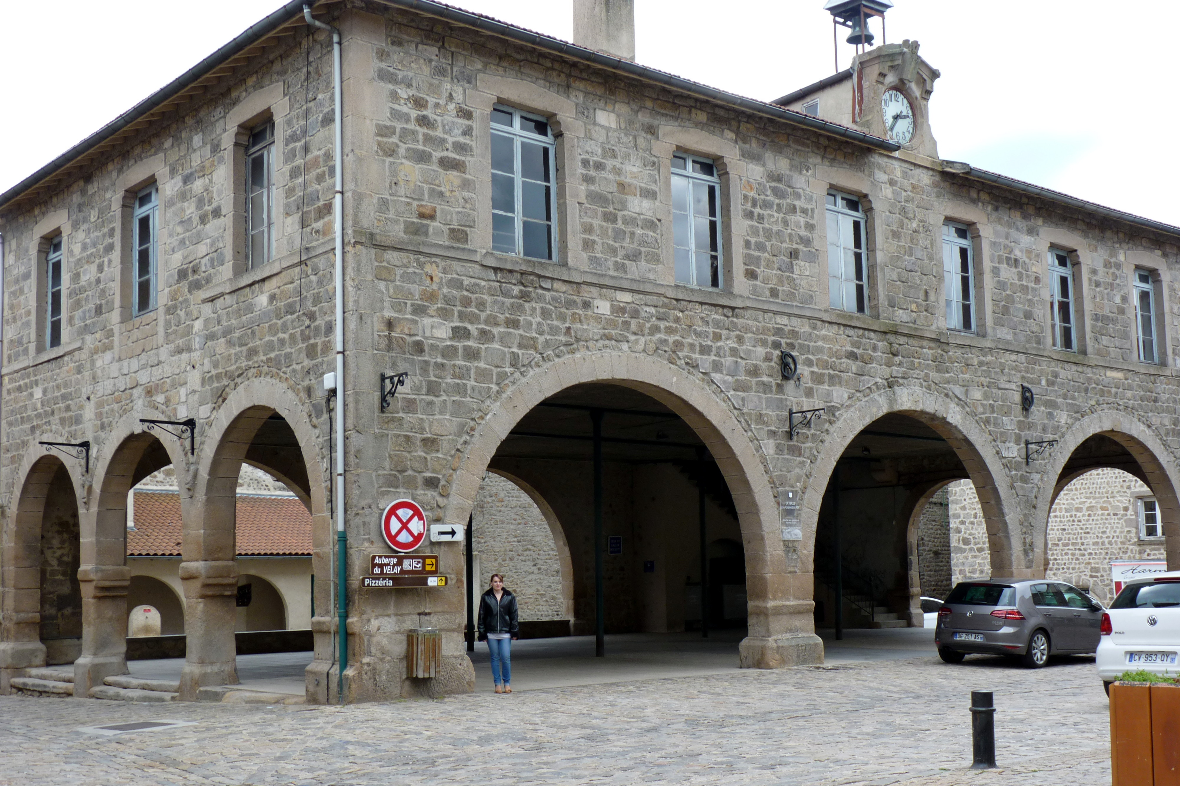 La Halle a été inaugurée en 1883 et construite comme symbole laïque à l'initiative du Maire radicale Ferréol et son adjoint François Taix